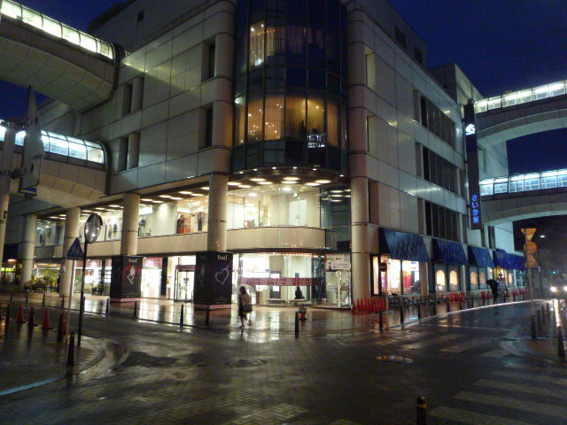 さいか屋 横須賀店新館を写した画像